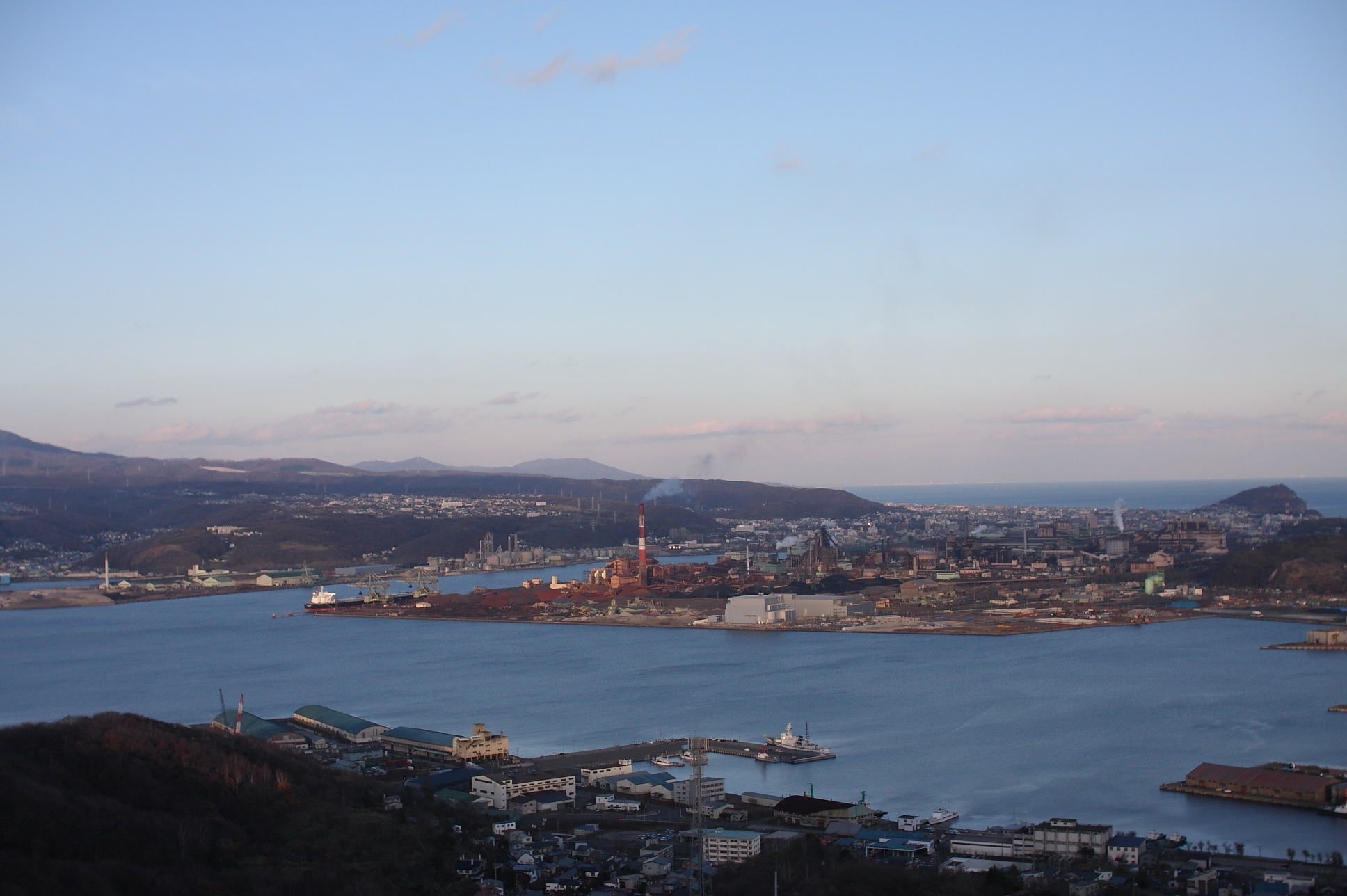 測量山より